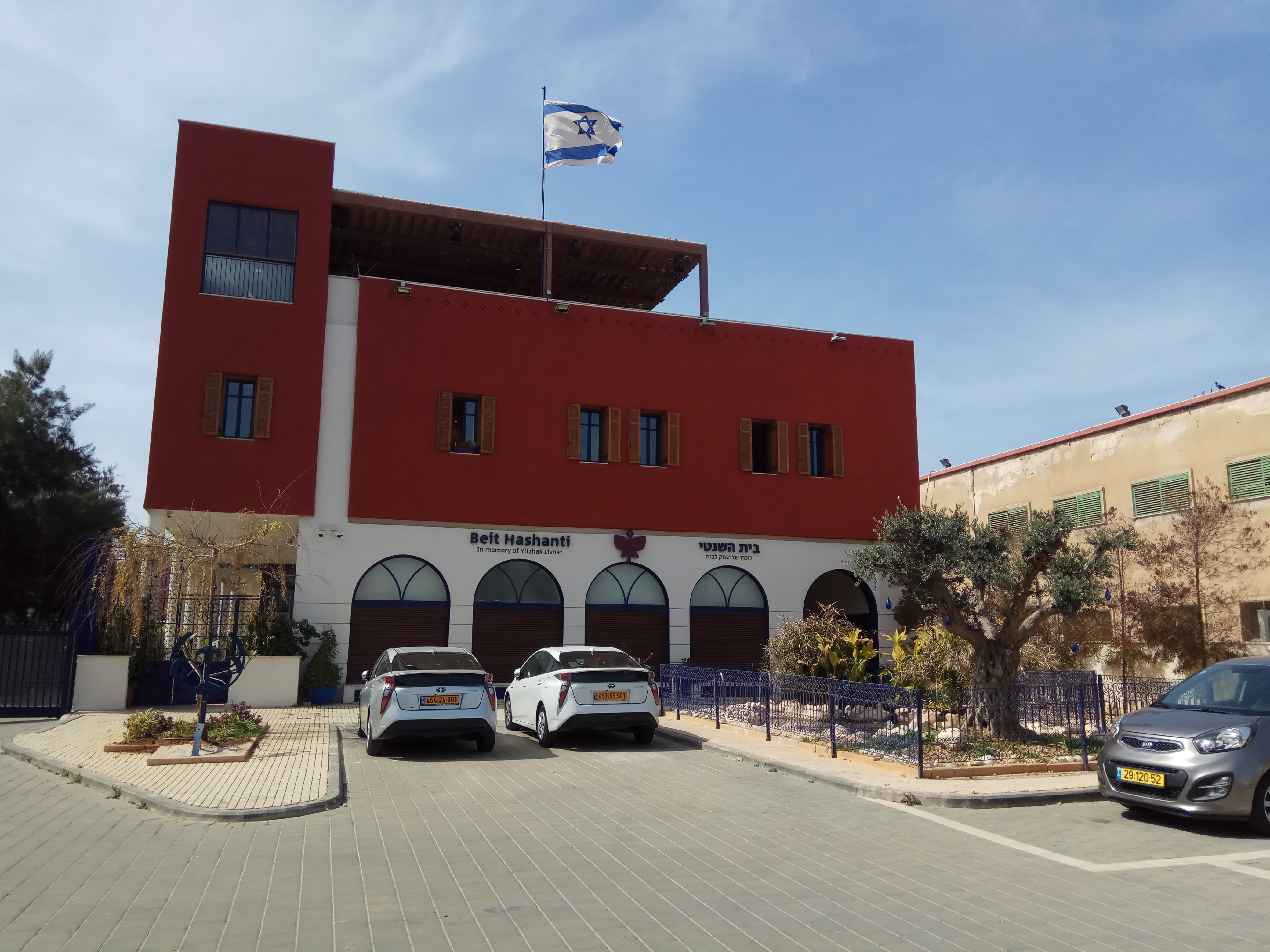 בית השנטי ברחוב נחום גולדמן 5 בתל אביב